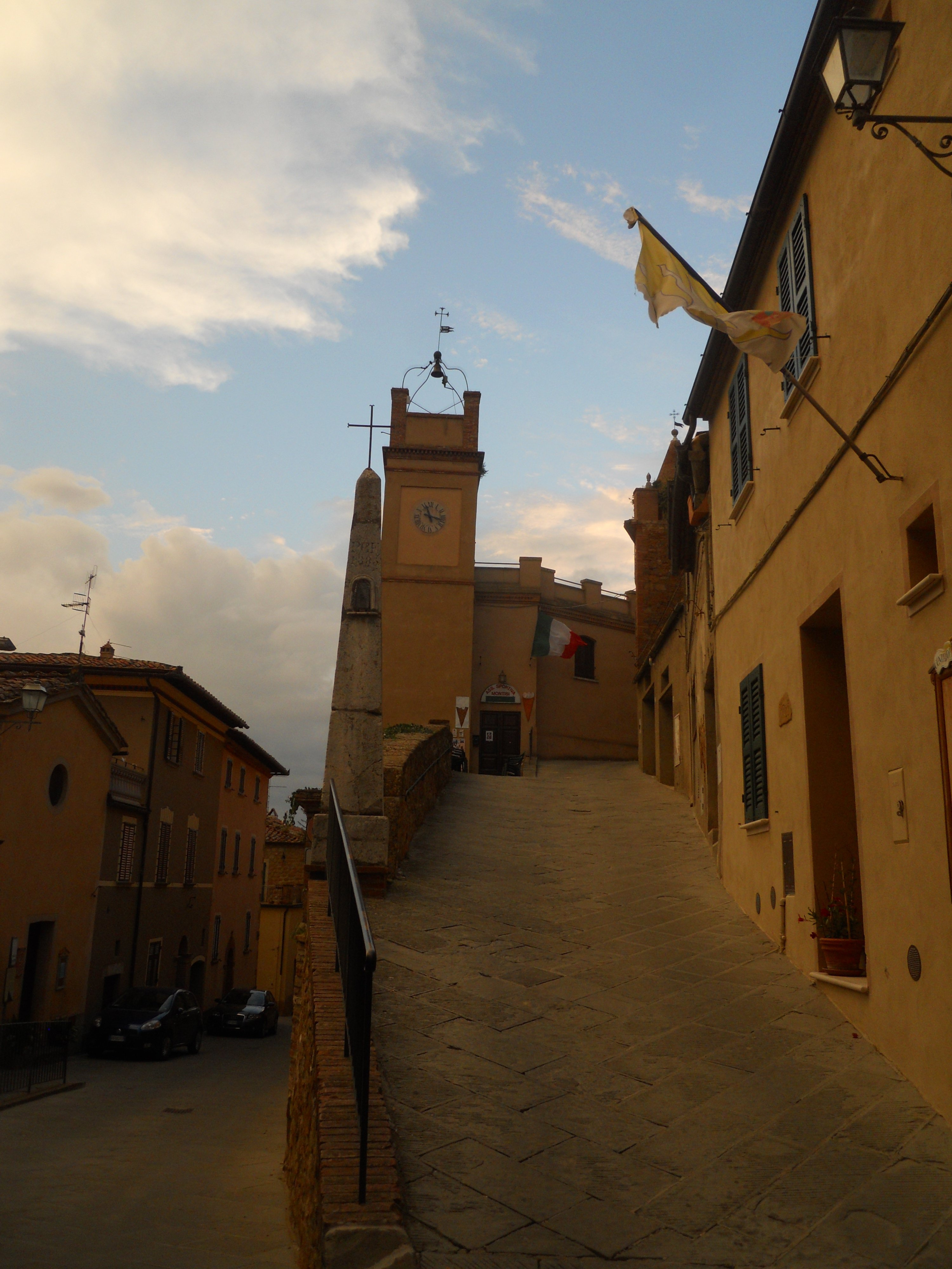 Veduta della Salita del Castello in Montisi, provincia di Siena, in un'immagine scattata nel tardo pomeriggio.